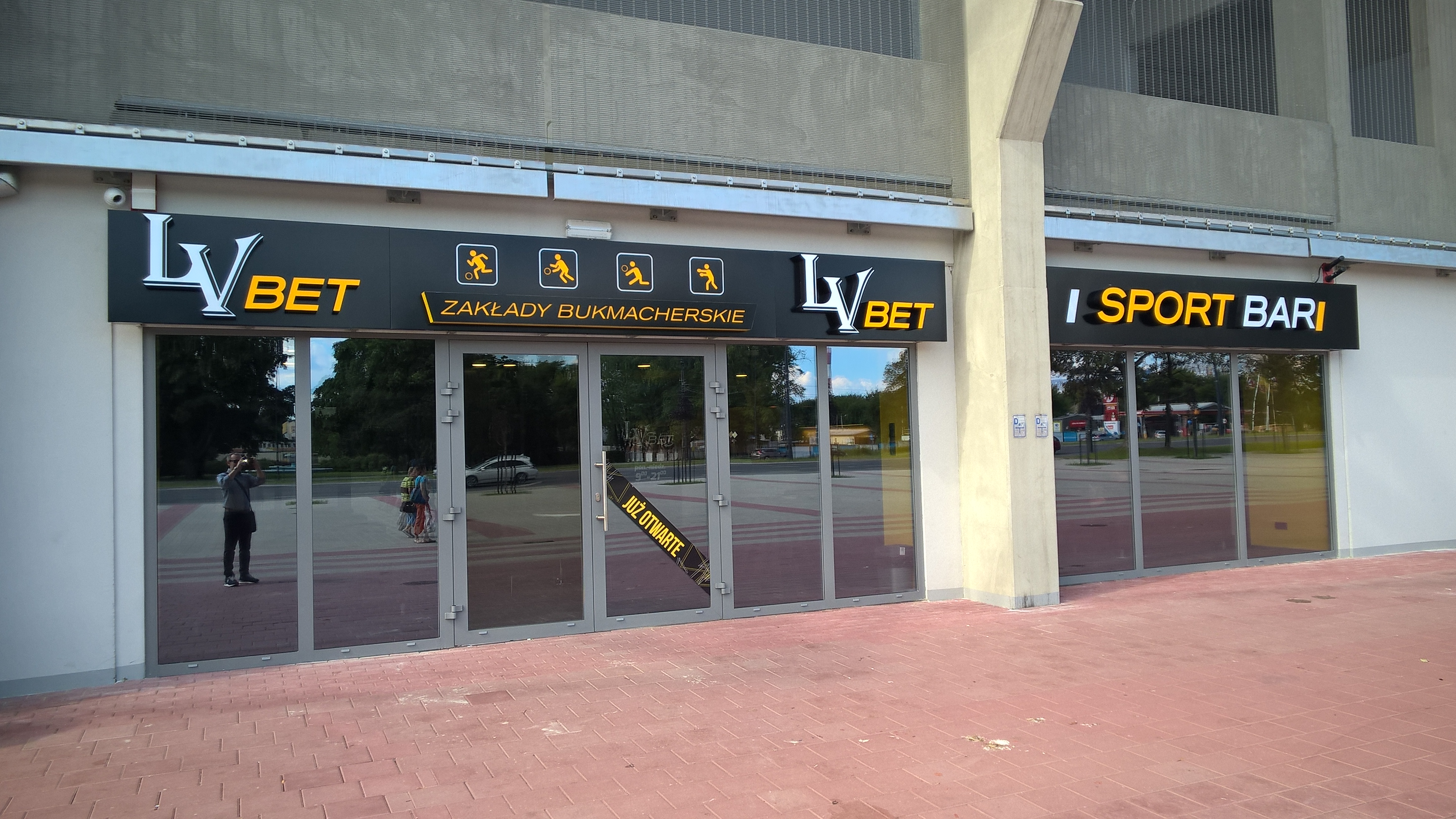 Nowy stadion Widzewa – lokal LVBet Sport Bar pod trybuną "D" (lipiec 2017)